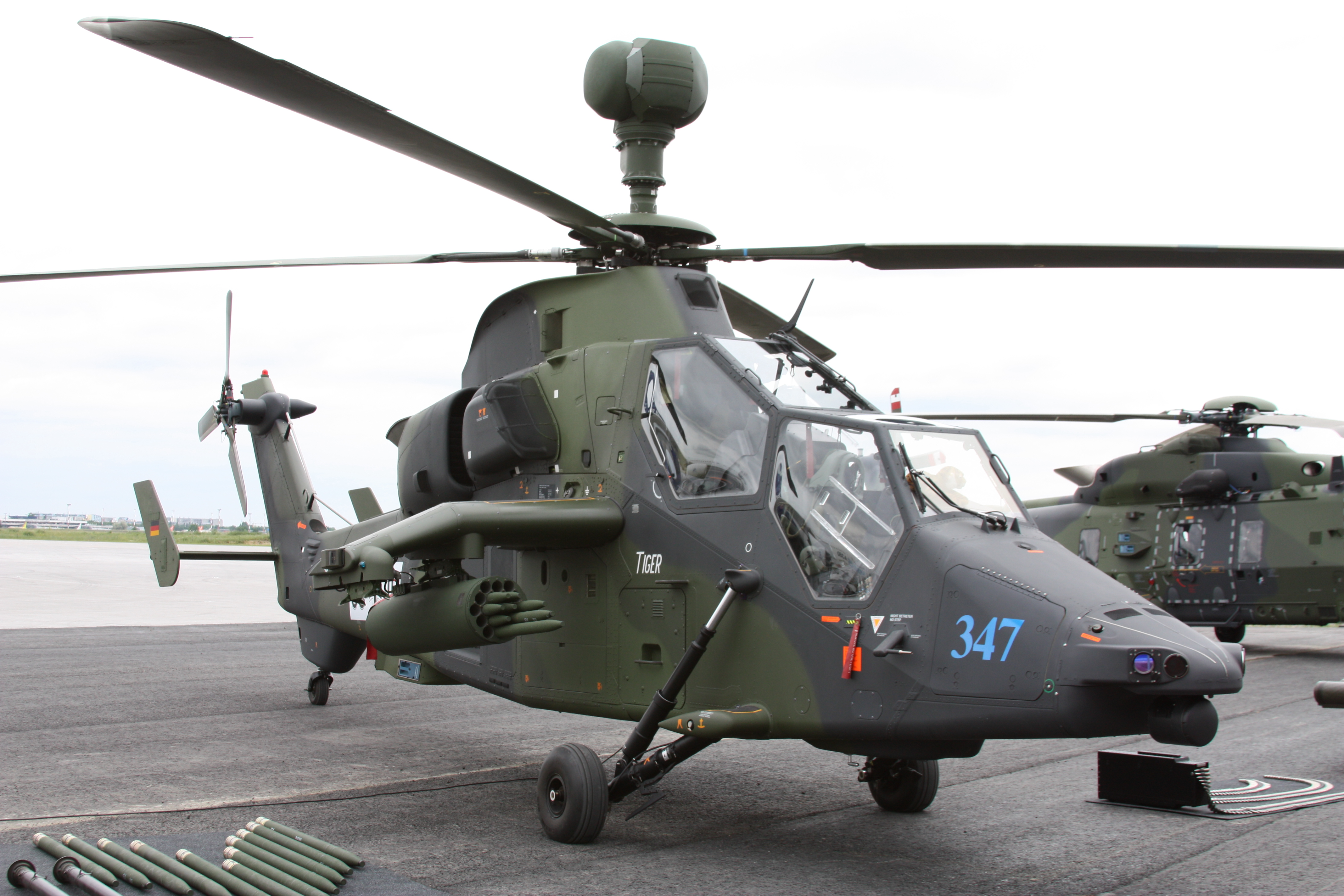 ILA 2010, am Samstag aufgenommen, meist erhöht von einer Leiter fotografiert